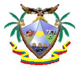 Escudo del municipio Páez, estado Zulia, Venezuela